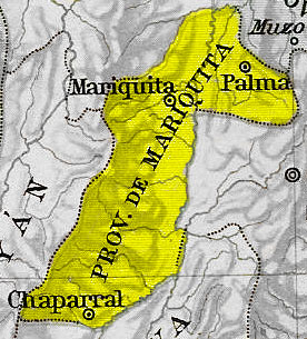 Mapa de la Provincia de Mariquita en 1810 y 1830